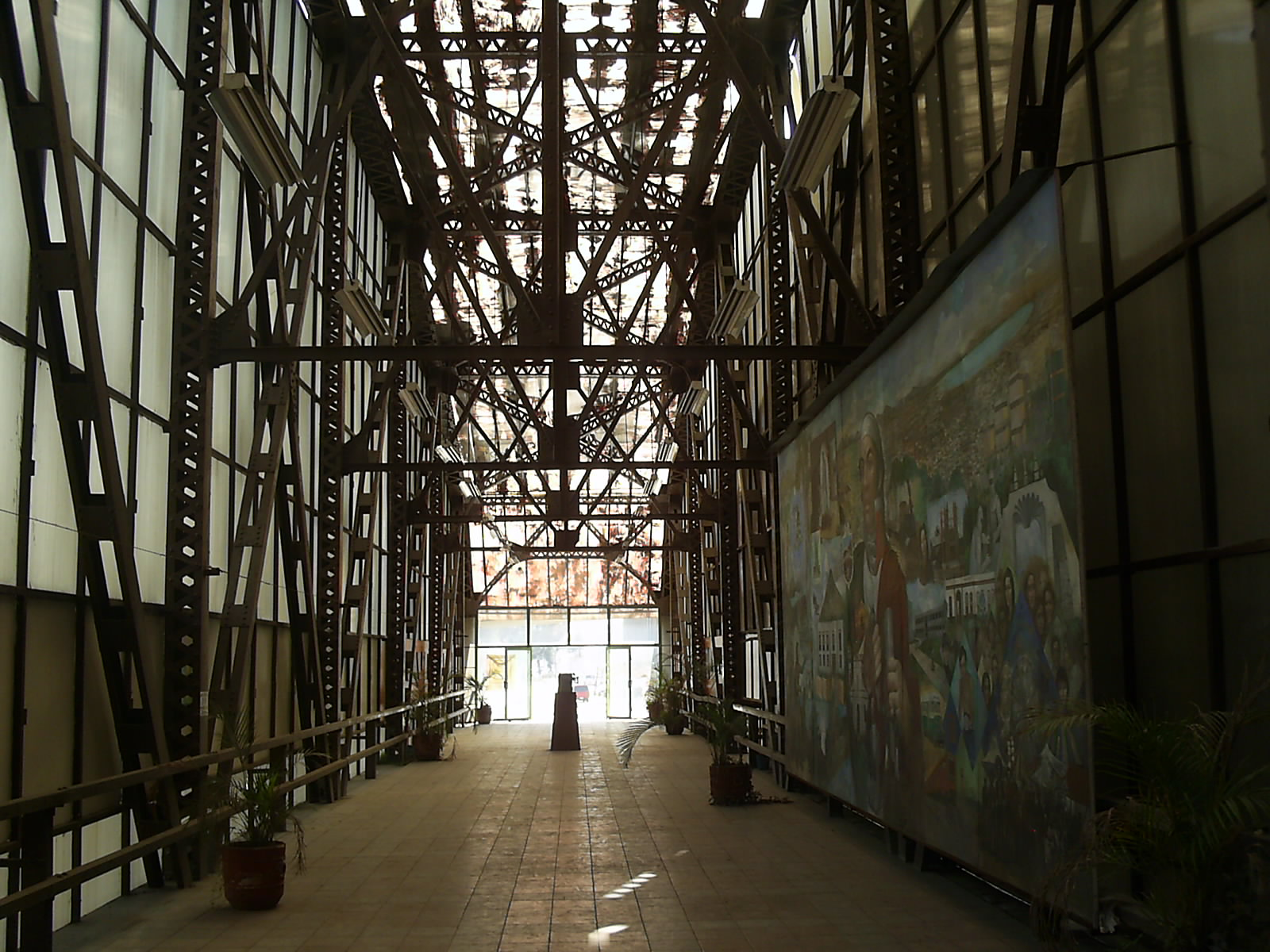 Interior del museo puente de arte en Ecatepec Mexico